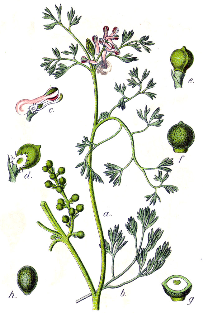 Fumaria parviflora Lam. Original Caption Kleinbluminger Erdrauch, Fumaria parviflora